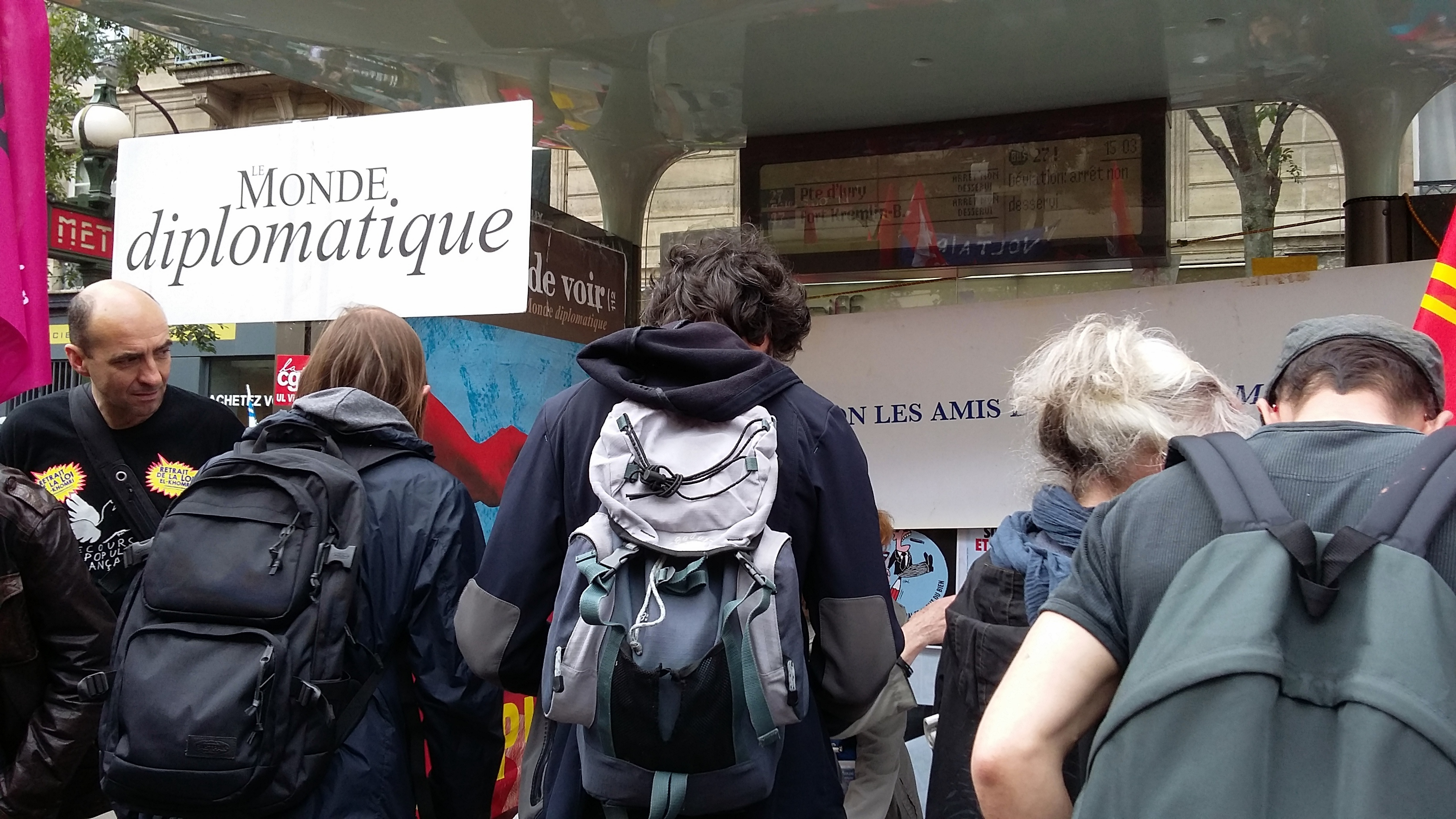 Vente du Monde diplomatique sous un abribus par les militants de l'AMD le long d'un cortège de manifestants